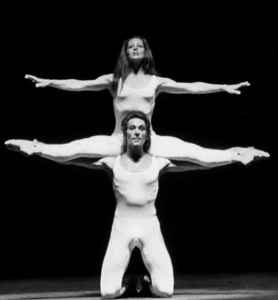 Susana Agüero, Halo, Oscar Araiz, Teatro Colón 1976